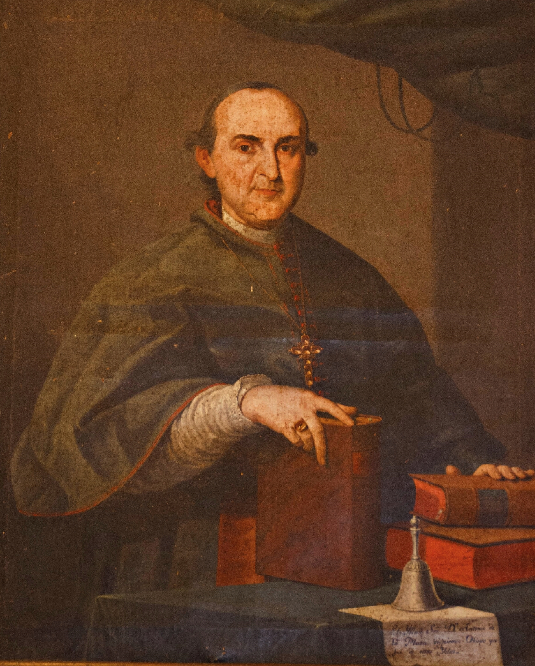 Retrato de Antonio Martínez de la Plaza, obispo de Canarias. Obra atribuida a Luis de la Cruz y Ríos.